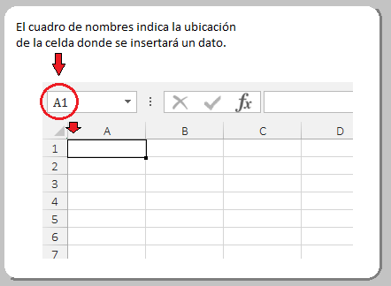 Dirección de una celda en Microsoft Excel